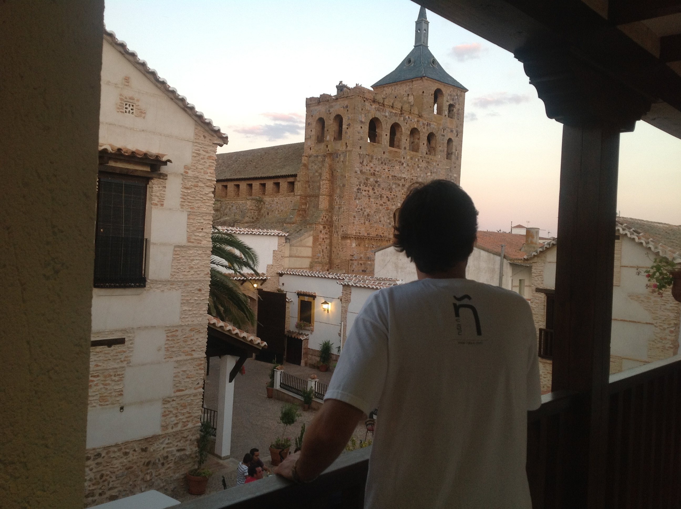 Estudiante de español contempla una panorámica de la Iglesia de San Andrés Apostol (Moral de Calatrava-Ruta Ñ)